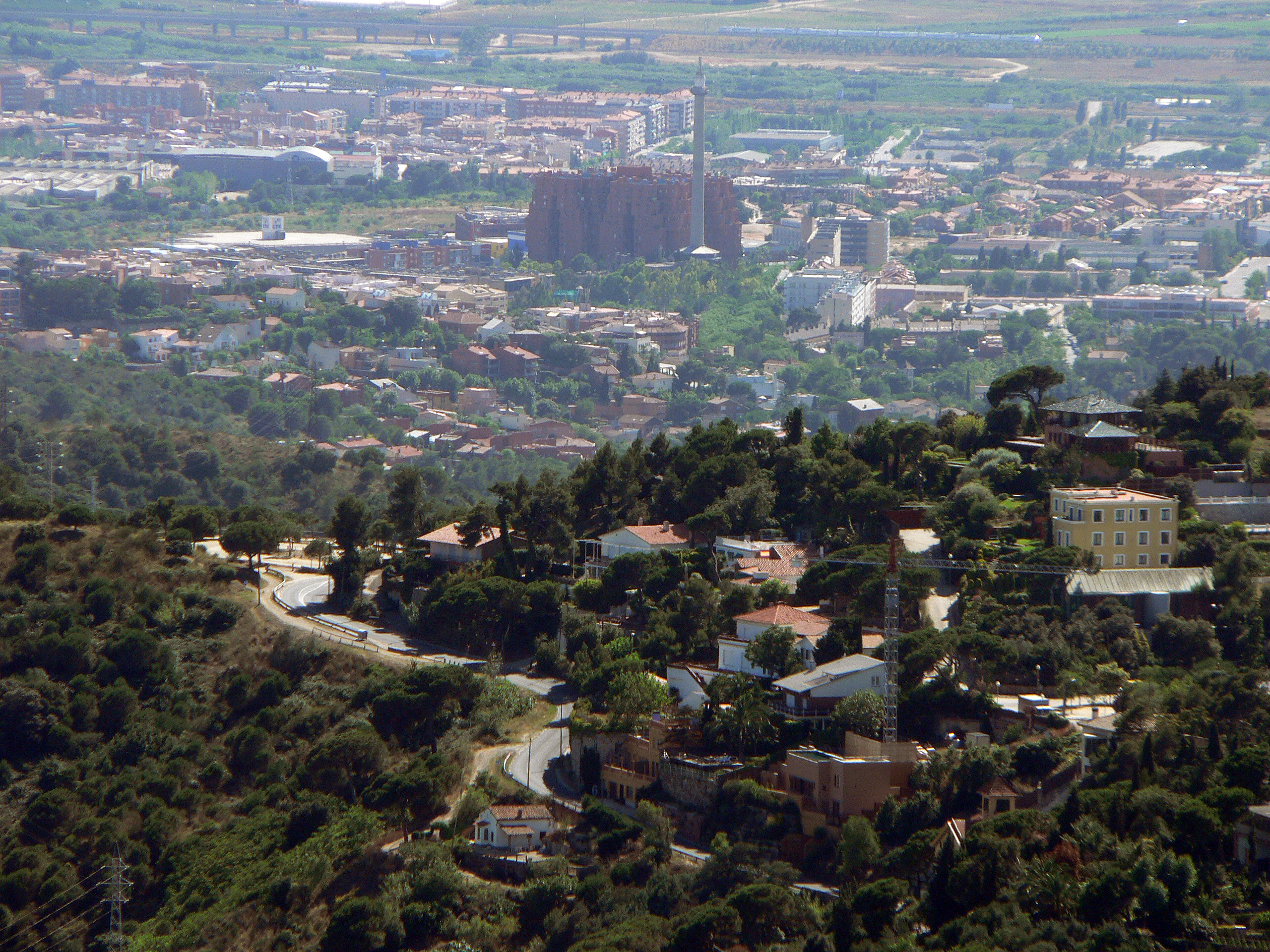 Vista de Sant Just Desvern (Comtat de Barcelona, Regne d'Espanya) des del Temple del Sagrat Cor del Tibidabo. En un segon pla, es veu part de la vila de Sant Just Desvern: el Walden 7 és l'edifici que s'identifica millor, però també es poden veure l'edifici popularment conegut com "la Plaça de toros" -a la cantonada dels carrers Miquel Reverter i Indústria- i el recinte del cementiri.